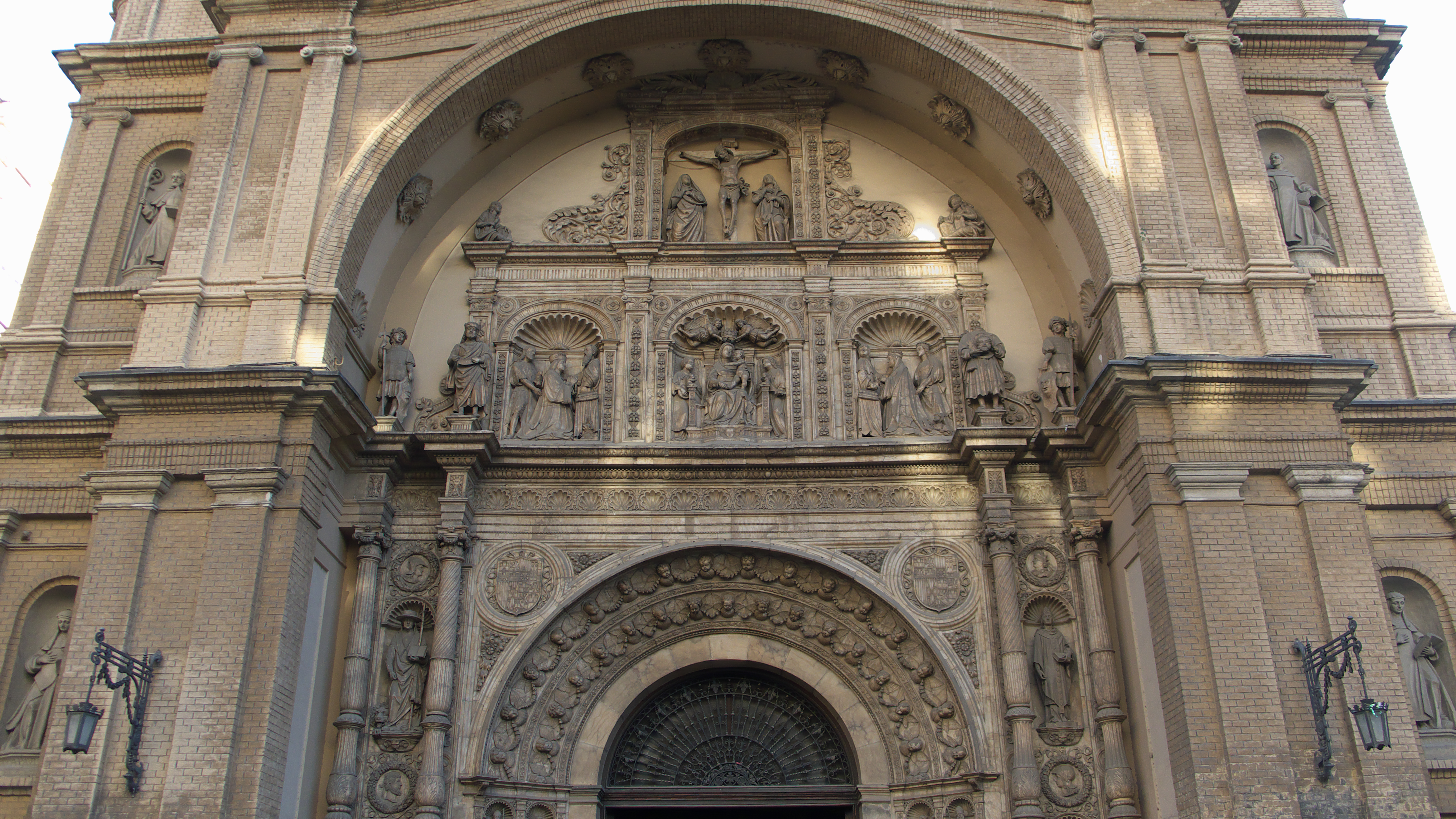 Fernando II de Aragón cumple los deseos de su padre Juan II y funda el monasterio jerónimo. Destruído por la invasión francesa (1808), se conserva las trazas renacentistas de esta magnífica portada de Gil Morlanes el Viejo (1504-1514), el escultor de Fernando el Católico (1943), pieza fundamental del plateresco español.